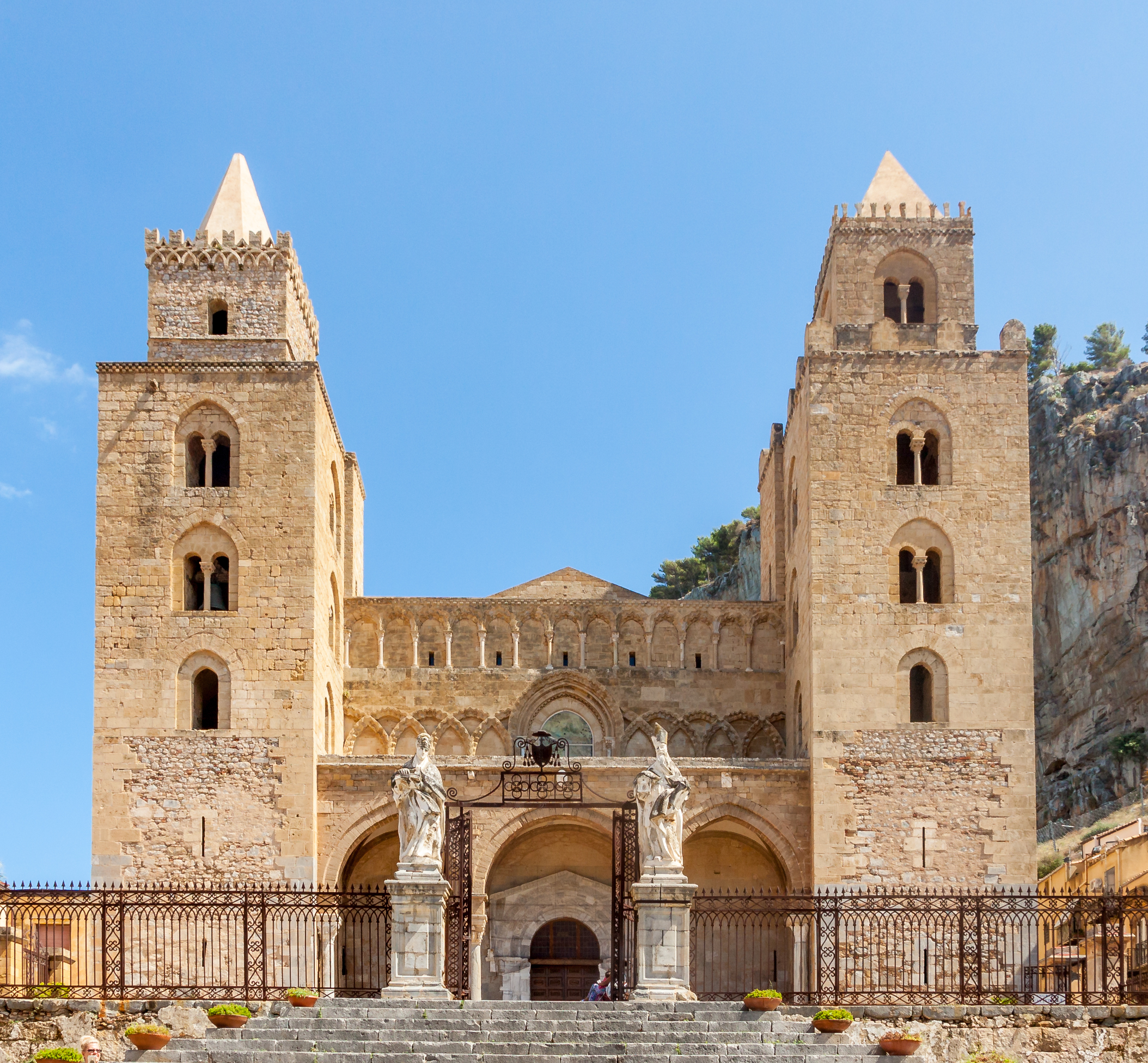 Der Dom von Cefalu